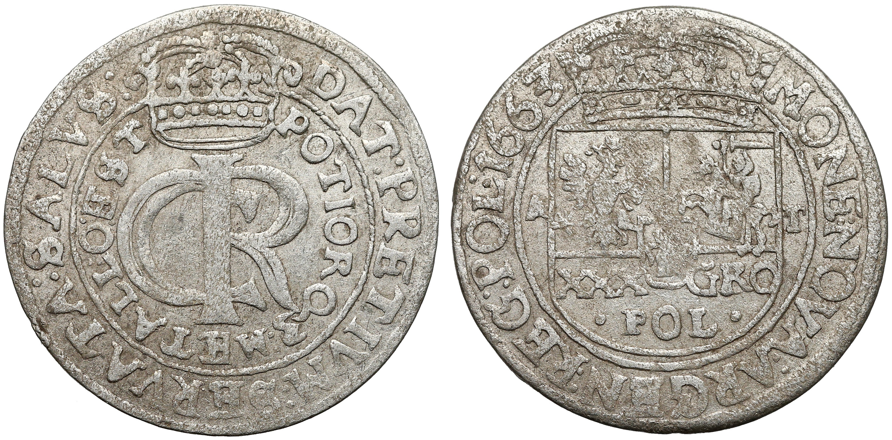 Tymf koronny 1663 Lwów